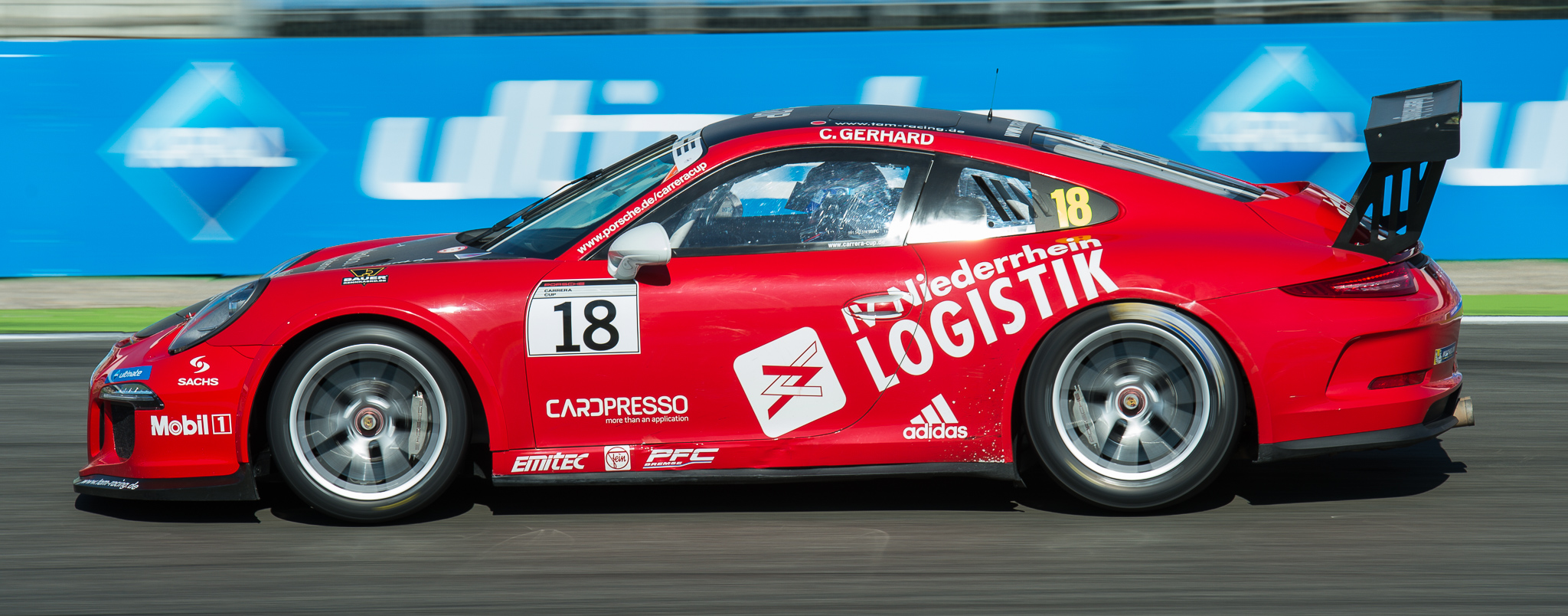 Christopher Gerhard,Hockenheimring,Motorsport,Porsche 911 GT3 Cup (Typ 991),Porsche Carrera Cup Deutschland,TAM Racing